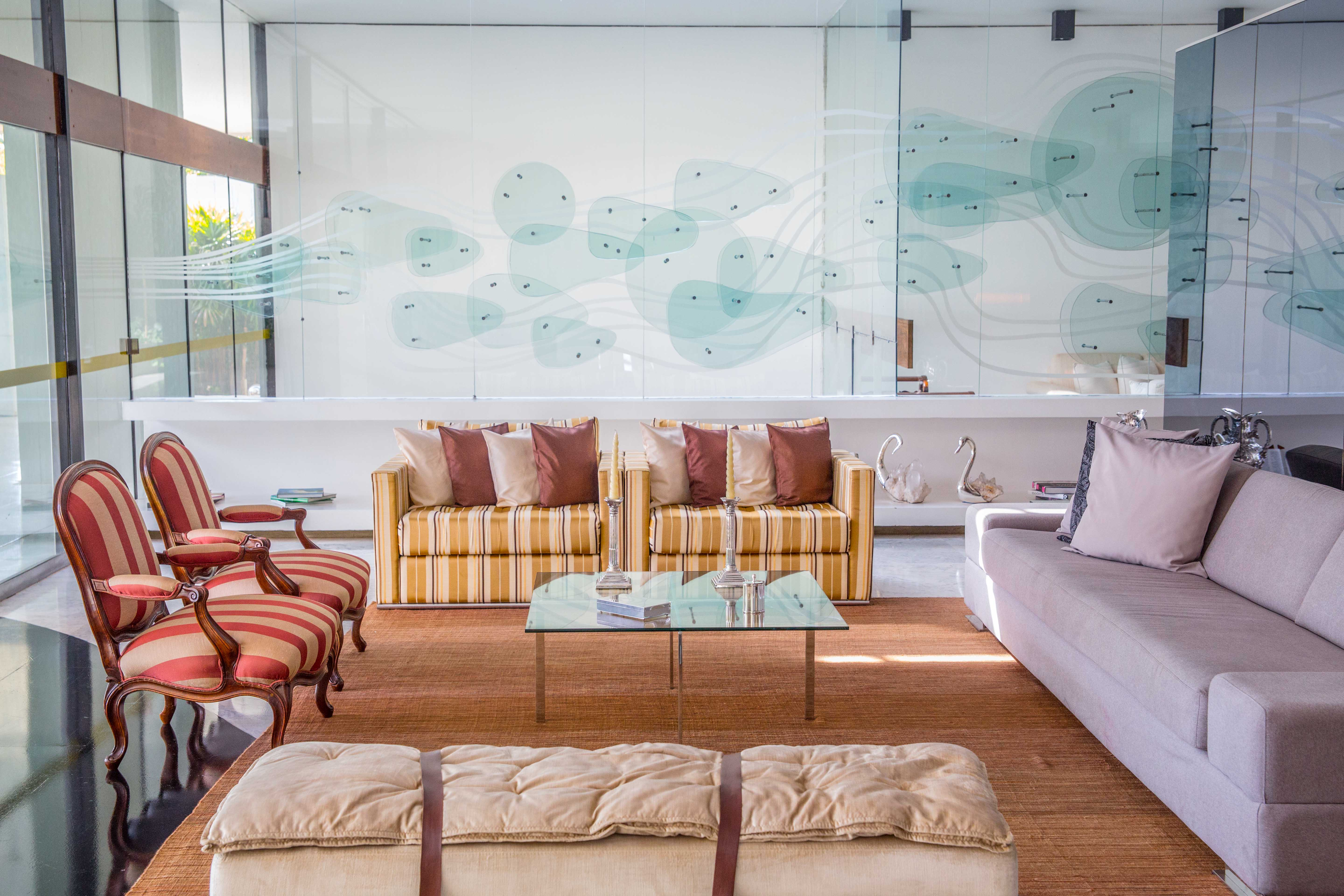 Palácio do Jaburu - Vitral de Marianne Peretti na entrada da sala de estar Foto: Anderson Riedel